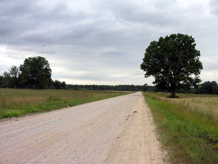 Plėnakiai, Mažeikių raj., Tirkšlių sen. Kelias iš Tirkšlių į Pievėnus per Plėnakių k. Kairėje pusėje matosi kaimo kapinaitės. Foto: Algirdas, 2006 m. rugpjūčio 5 d., Lietuva